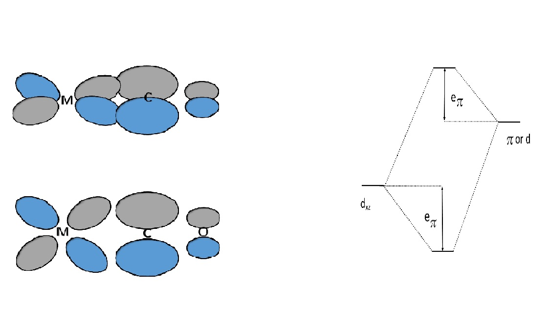 Orbitales Pi aceptor y su desdoblamiento